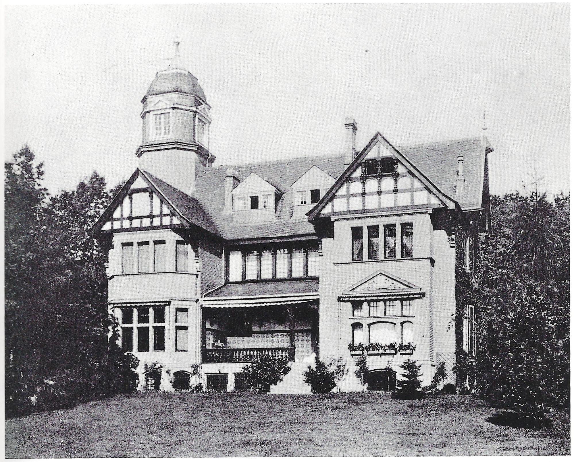 Villa Schmeltzer (1937 abgebrochen), Unter den Ulmen 154, Köln-Marienburg: Ansicht von Nordosten